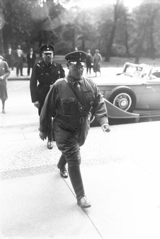 Die Eröffnung des neuen deutschen Reichstages am 30. August 1932 unter grossen polizeilichen Absperrungsmassnahmen ! Der nationalsozialistische Abgeordnete Hauptmann Göhring begibt sich in grosser Uniform zur Eröffnung des Reichstags.